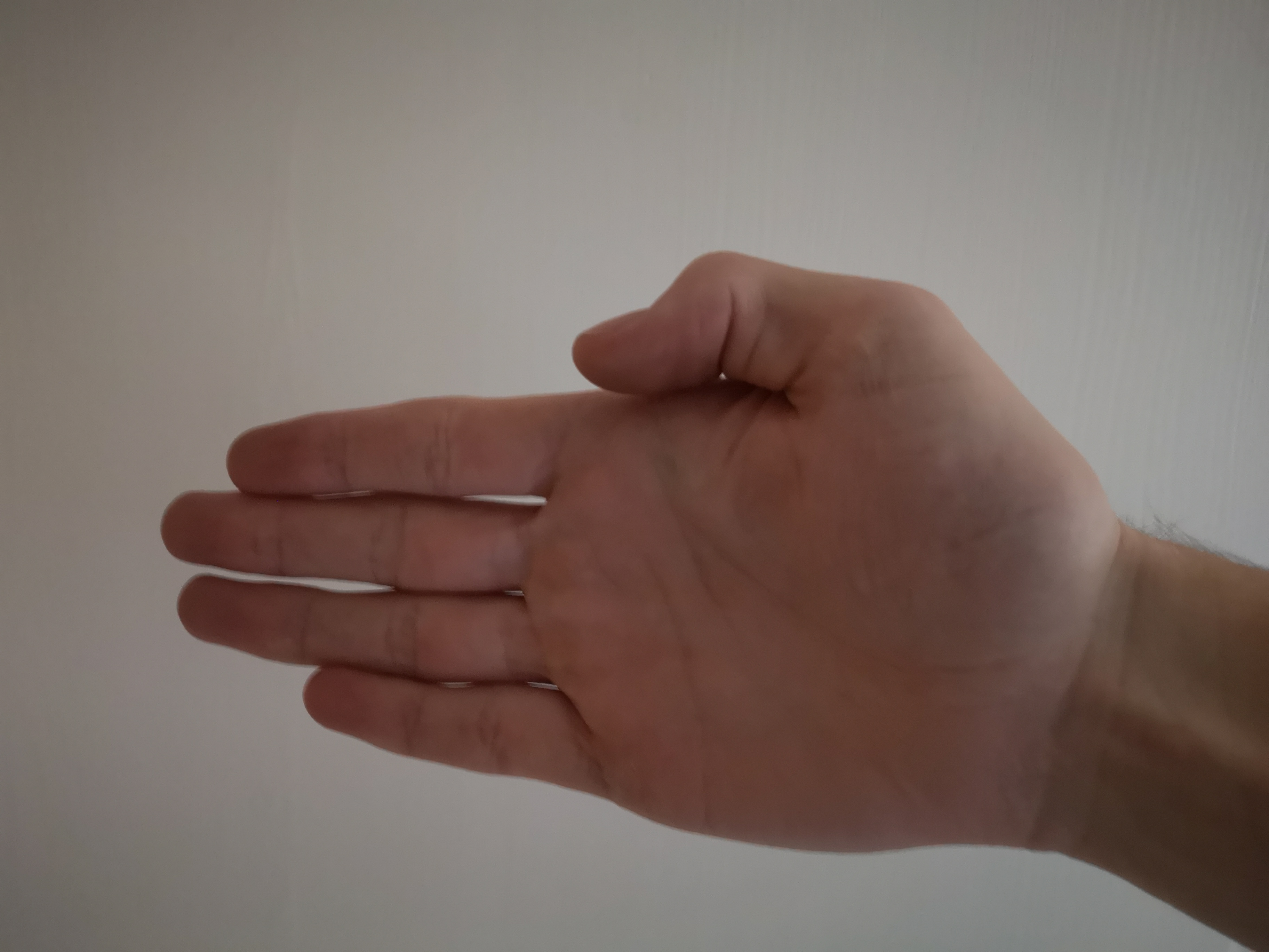 papir beskrivelse